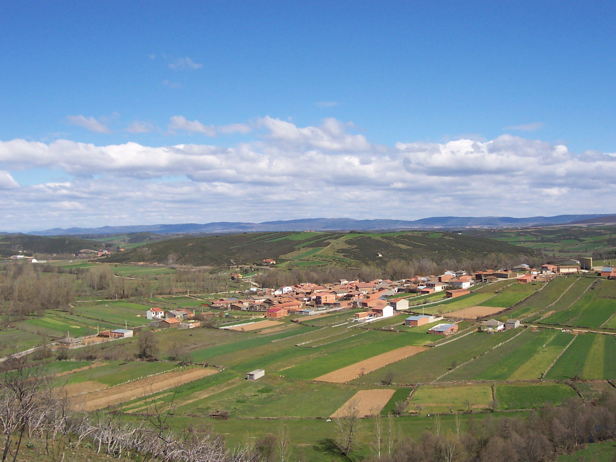 Gallegos del Río; Pueblo provincia de Zamora, España; Fecha: 04-2004